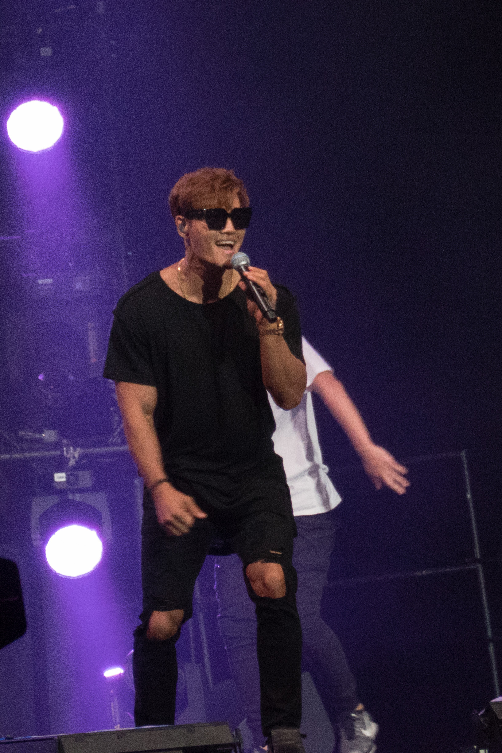 20160731-P1010011